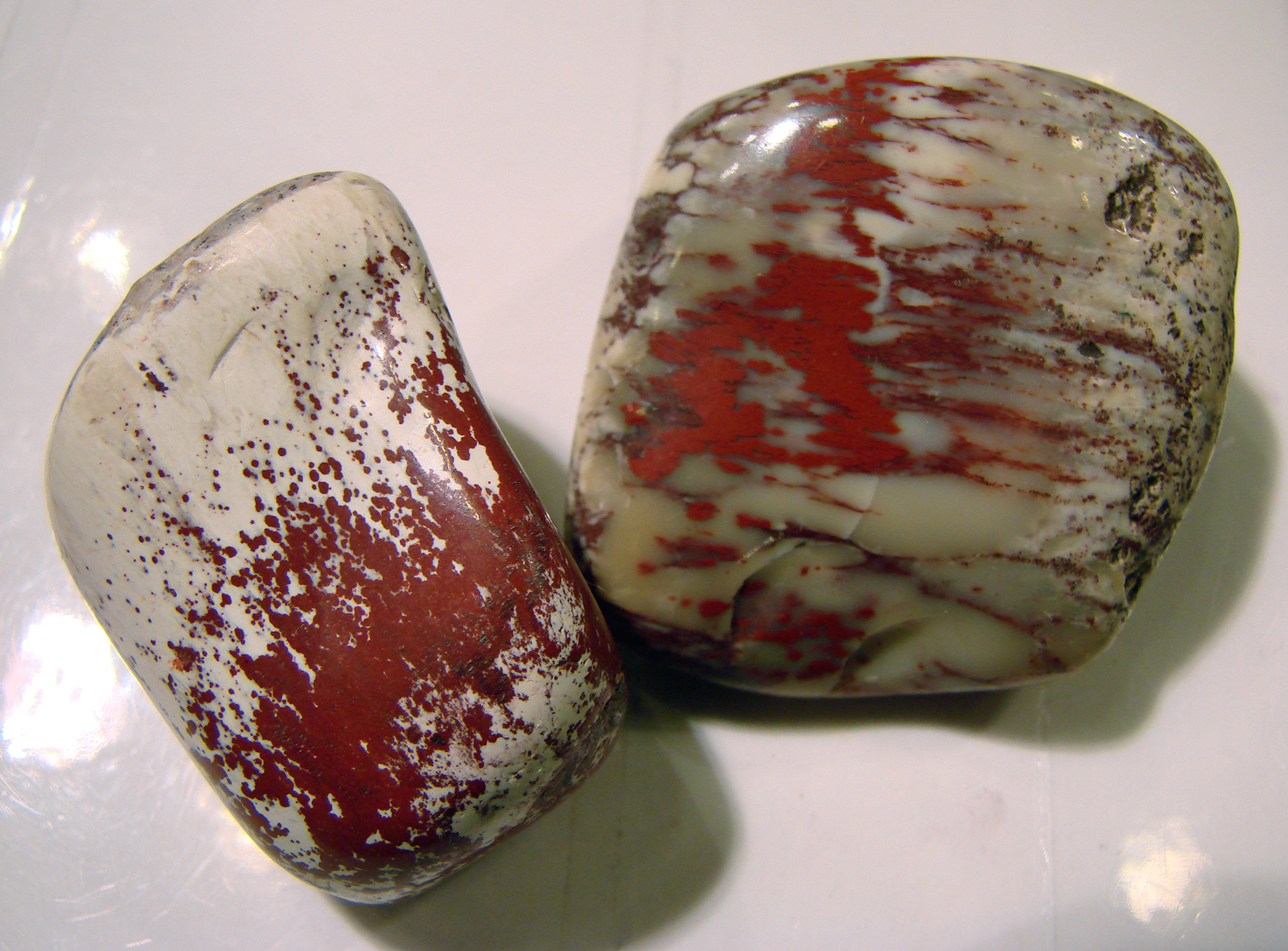 Cinabre et alunite, Arizona.